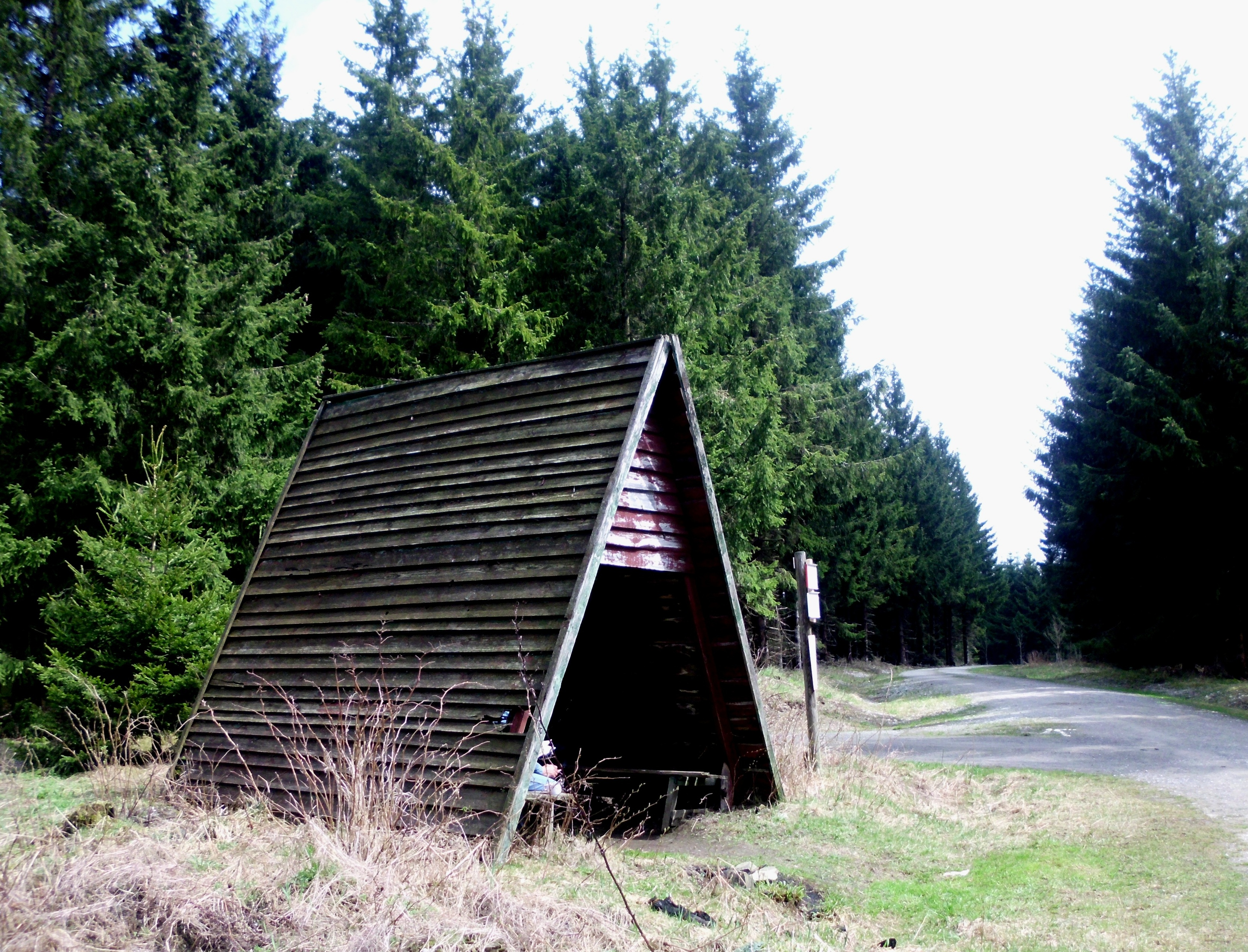 Walzenhütte bei Trautenstein